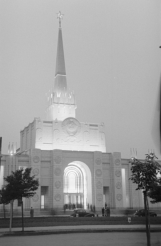 Original image description from the Deutsche Fotothek Sowjetischer Pavillon (Nachtaufnahme)